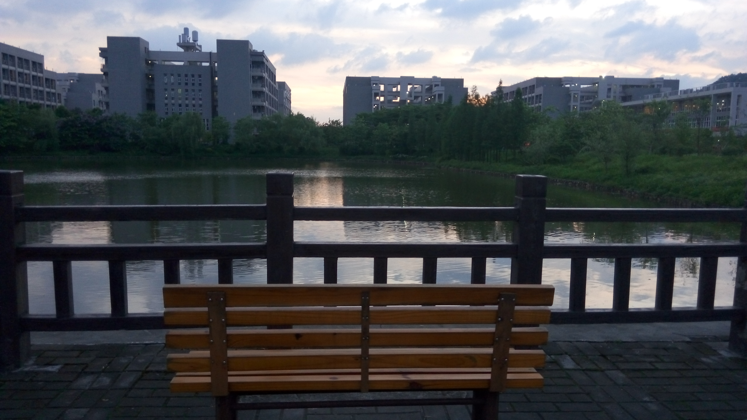 中文（中国大陆）: 广东南华工商职业学院禽兽湖